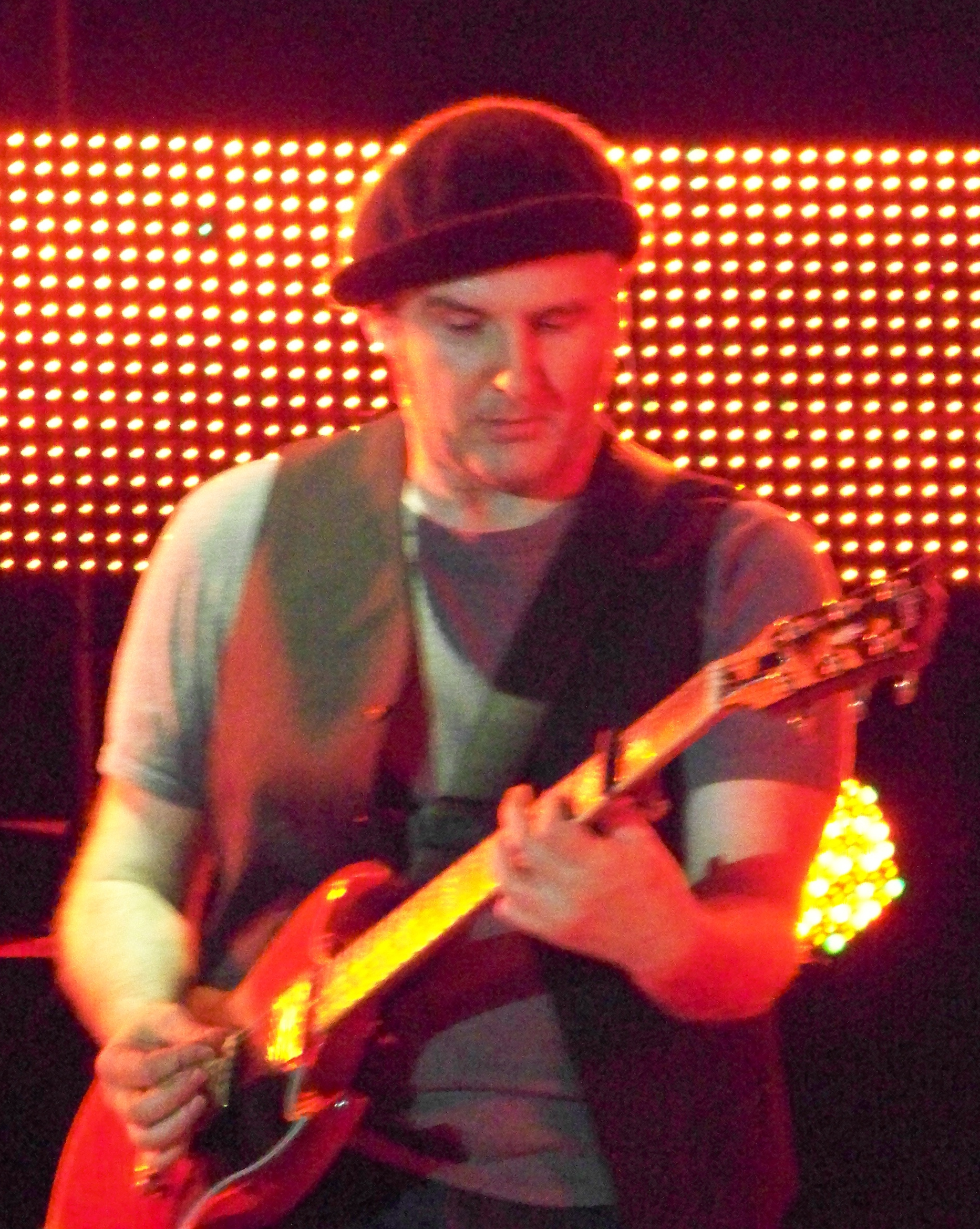 Juan Aguirre de AMARAL